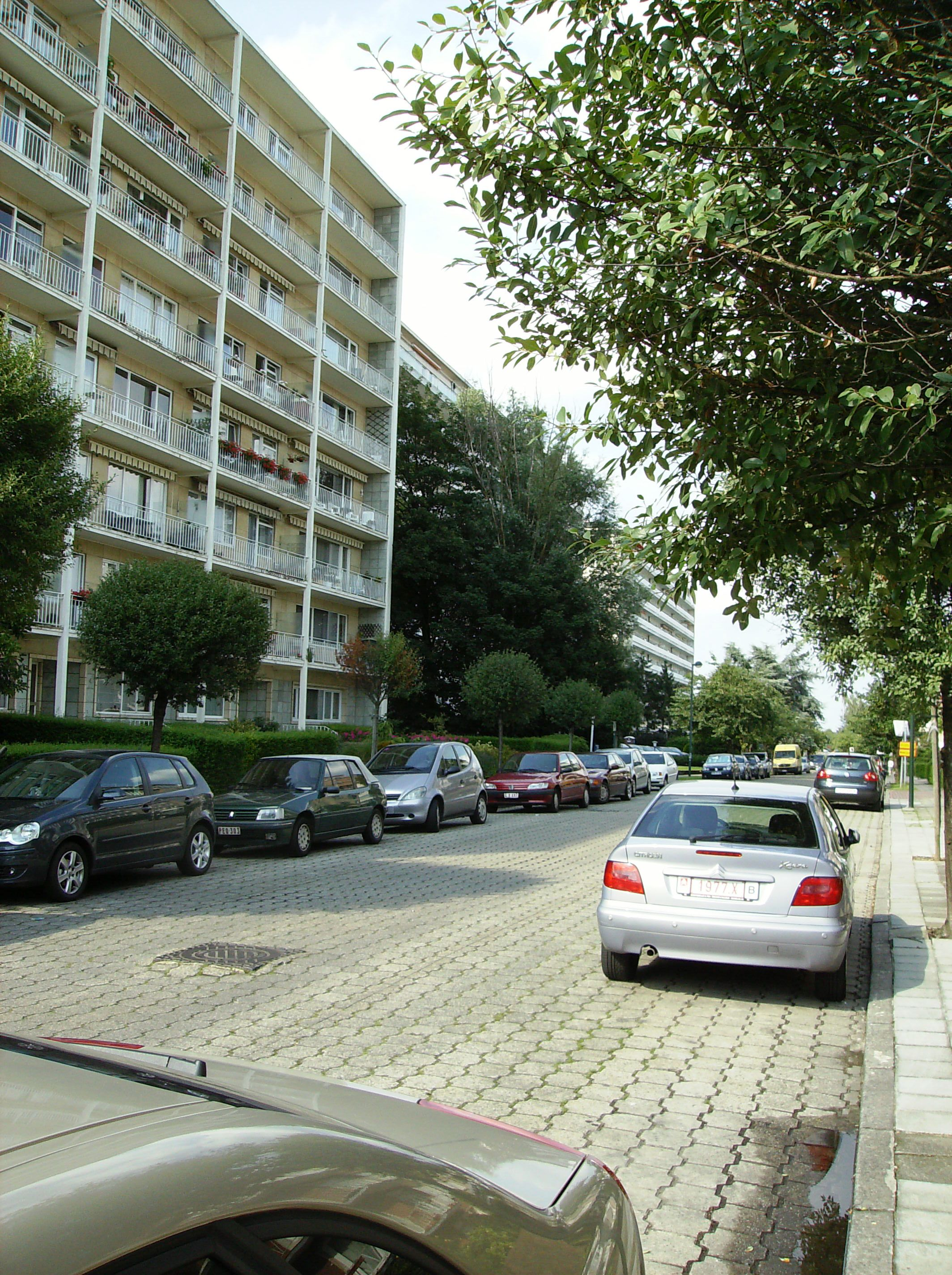 rue Thomas Frissen Auderghem Belgium